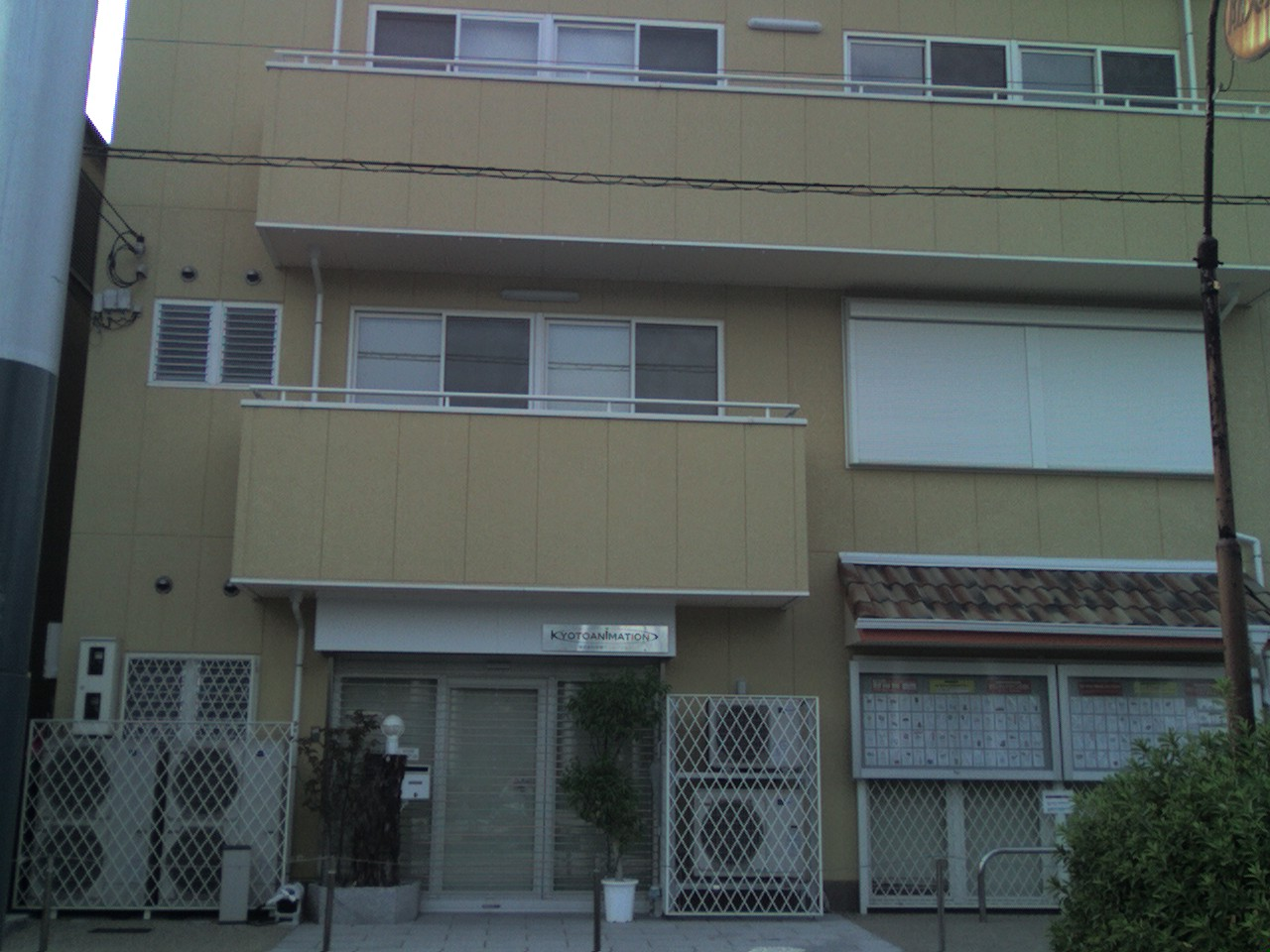 京都アニメーション 本社 若干、撮影環境の問題により、全体的に暗い写真となっているがあしからず。 2006年11月5日 (日) 14時ごろ。